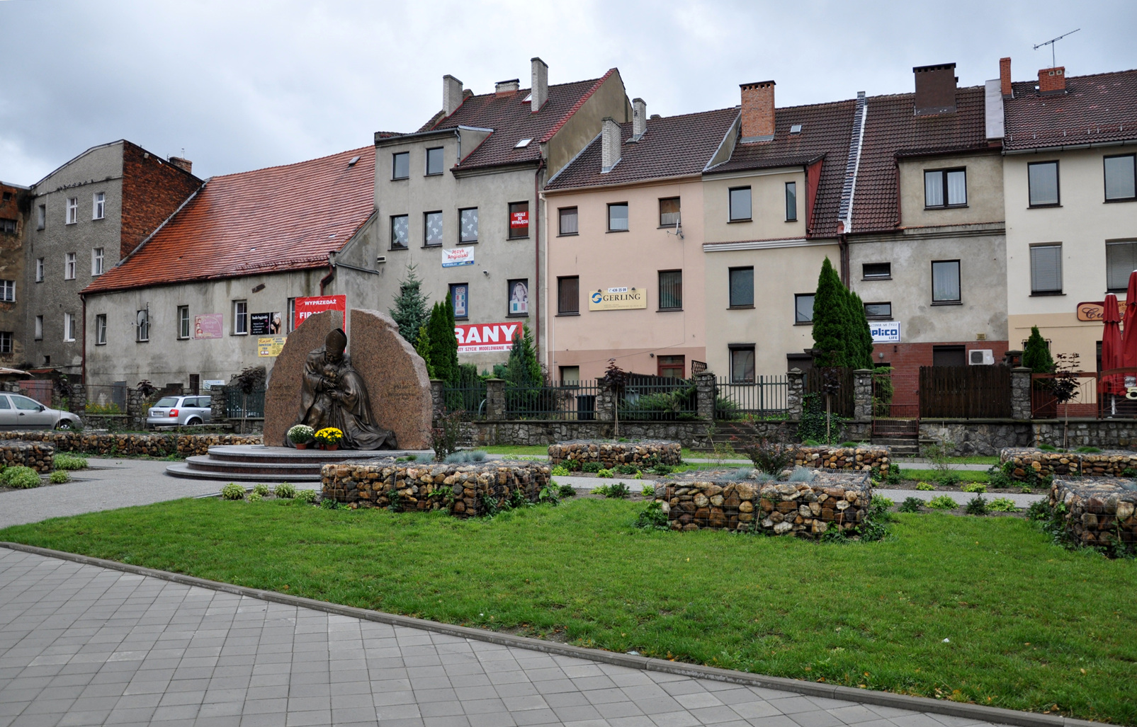 Plac Farny w Prudniku